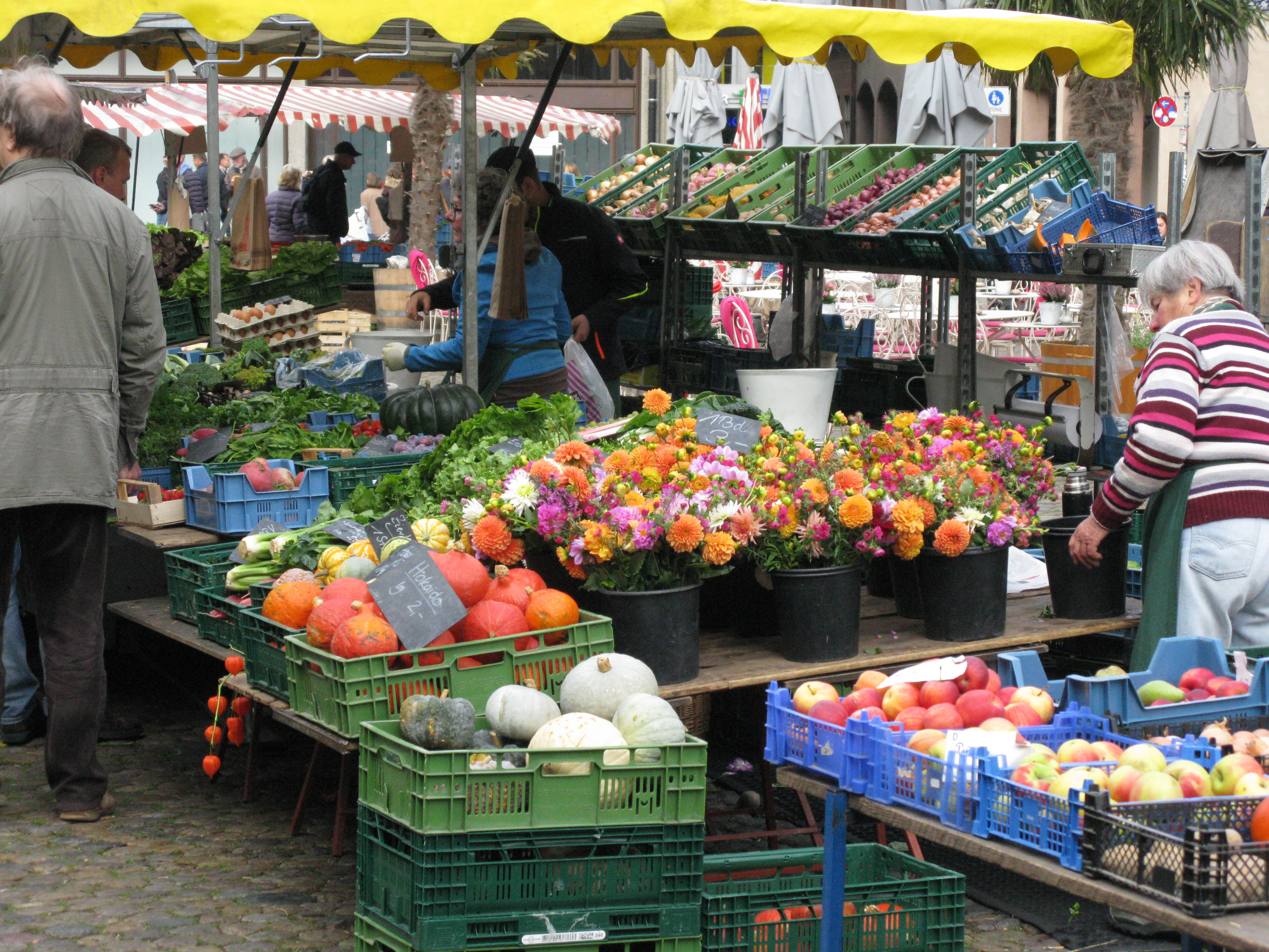 Markt auf dem Freiburger Münsterplatz